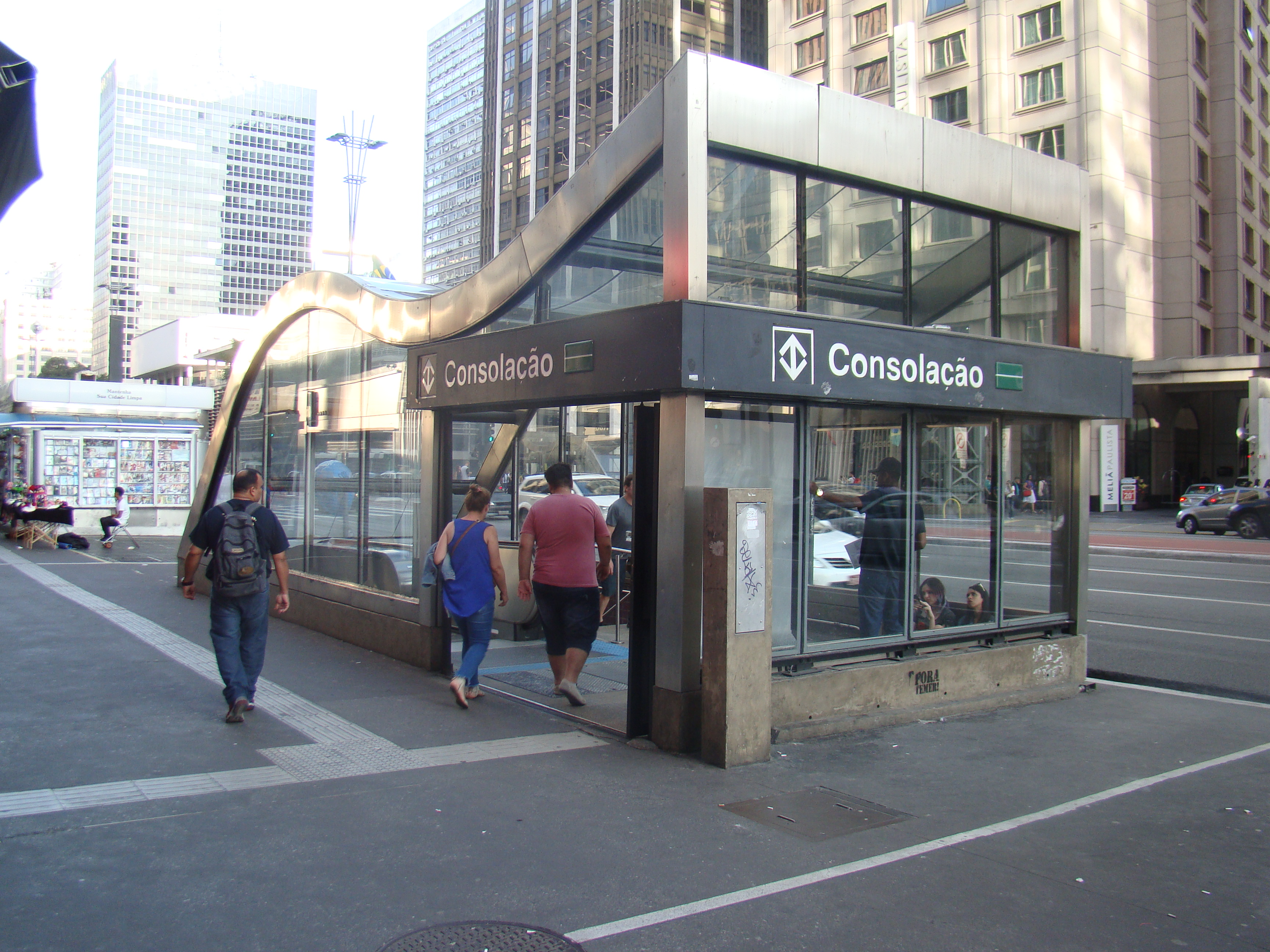 Estação Consolação, Metrô de São Paulo